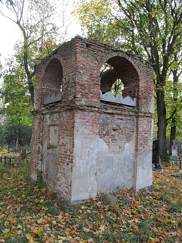 Яромічы. Капліца-надмагілле Васілеўскіх